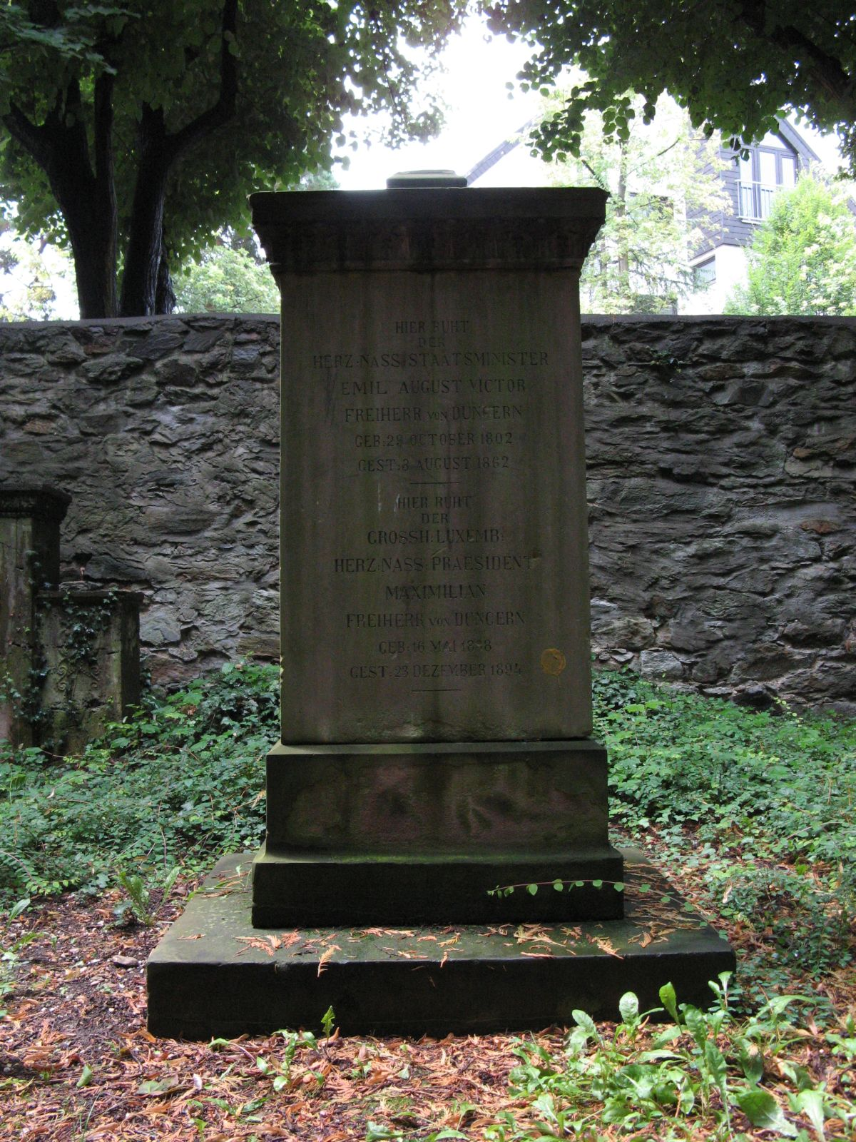 Grabstein von Emil August Freiherr von Dungern am alten Friedhof in Wiesbaden, Hessen